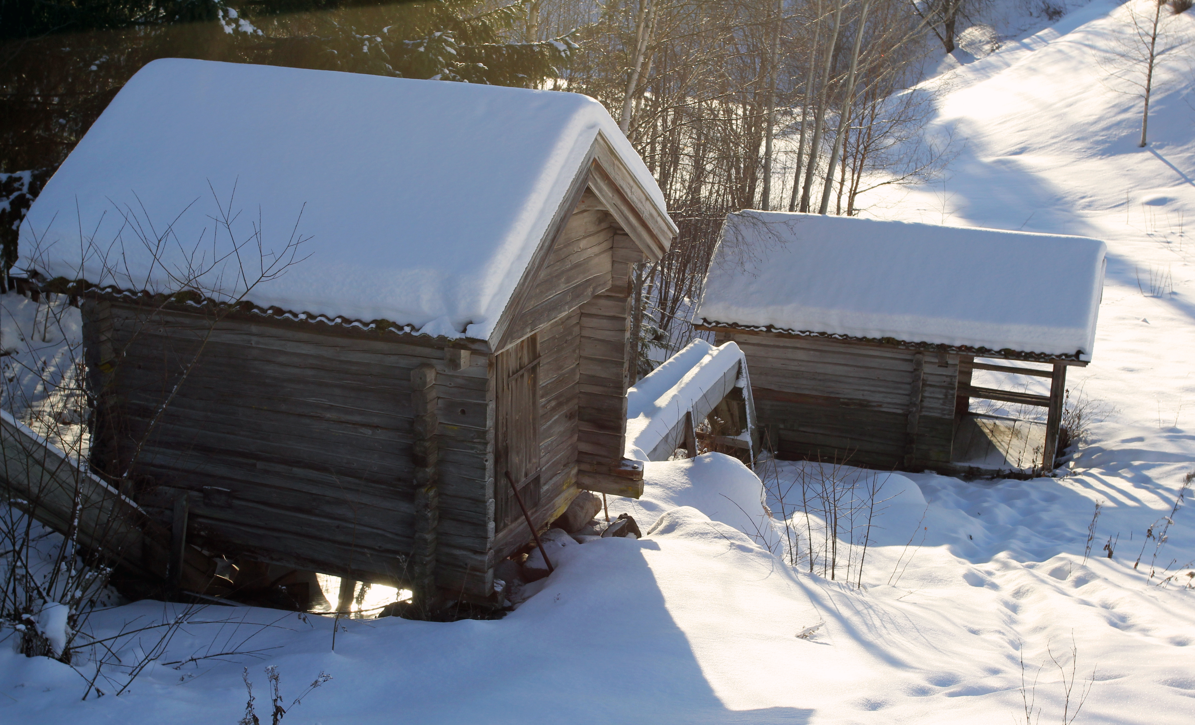 Skvaltkvarnarna i Hälla, Leksands kommun, Sverige.